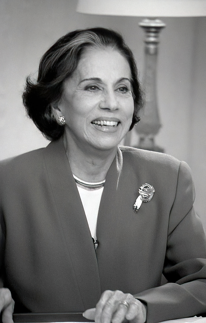 Alicia Pietri de Caldera (1923-2011), dos veces Primera Dama de Venezuela.